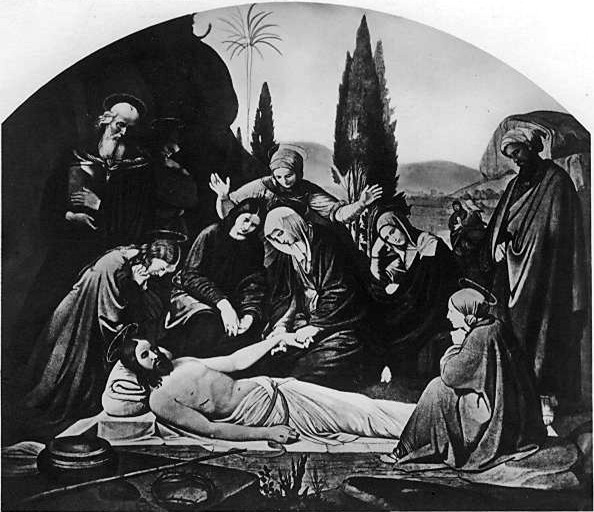 Friedrich Overbeck: Beweinung Christi, 1846, in St. Marien, Lübeck